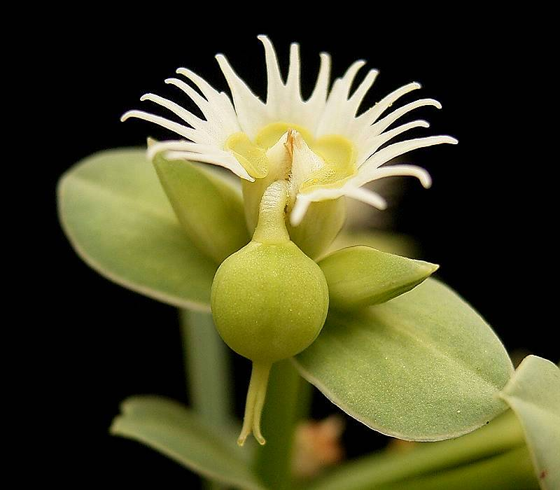 Euphorbia sarcodes